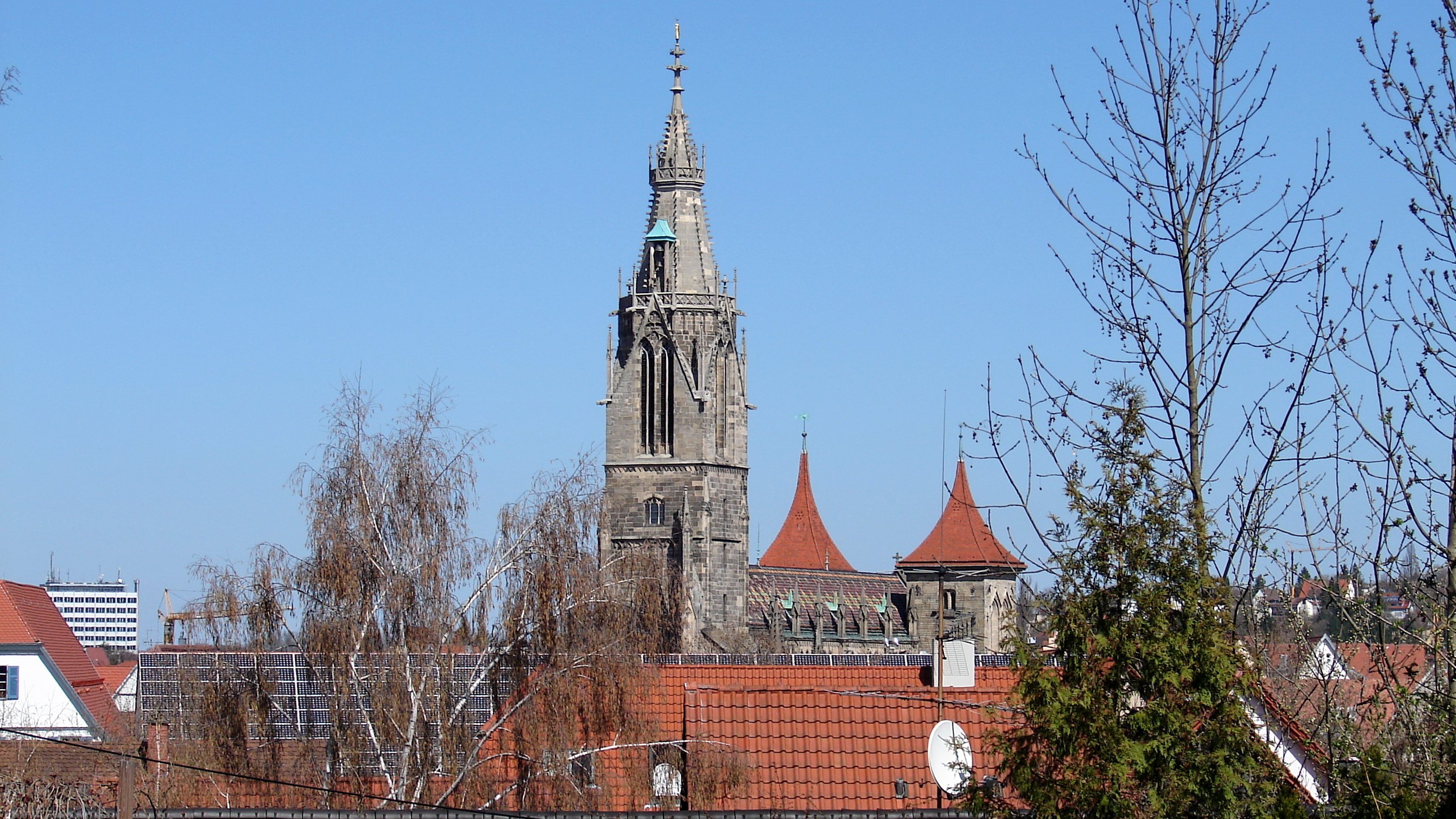 Die Marienkirche ist eines der Wahrzeichen Reutlingens. Sie wurde zwischen 1247 und 1343 erbaut und gilt heute als eines der schönsten und bedeutendsten Bauwerke der Gotik in Württemberg.